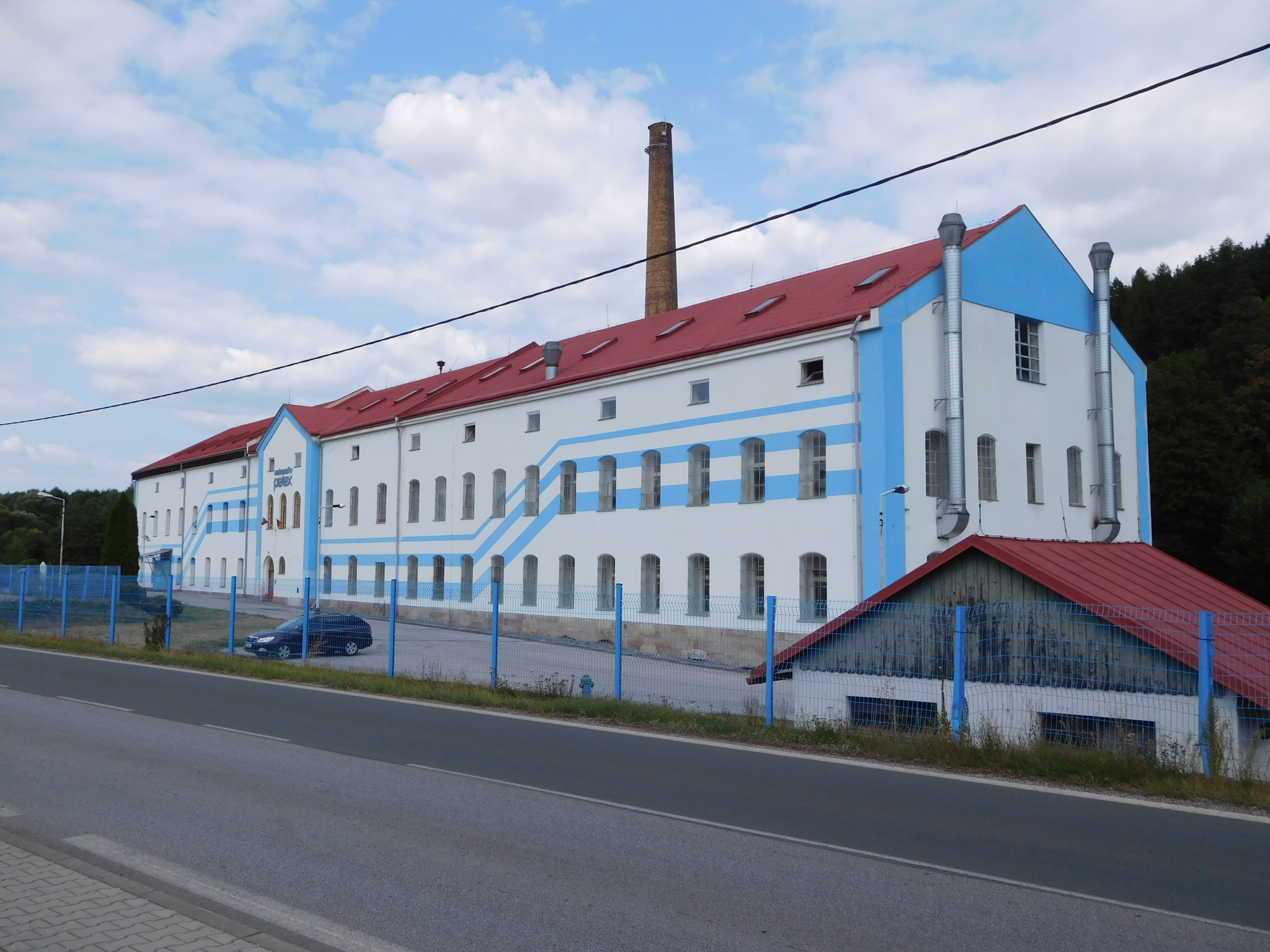 Hostinné - Vrchlabská 246, továrna Petex (původně průmyslový podnik bratří M. a J. Oestrreicherových - přádelna lnu a bavlny, později firma Johann Etrich, později Technolen)